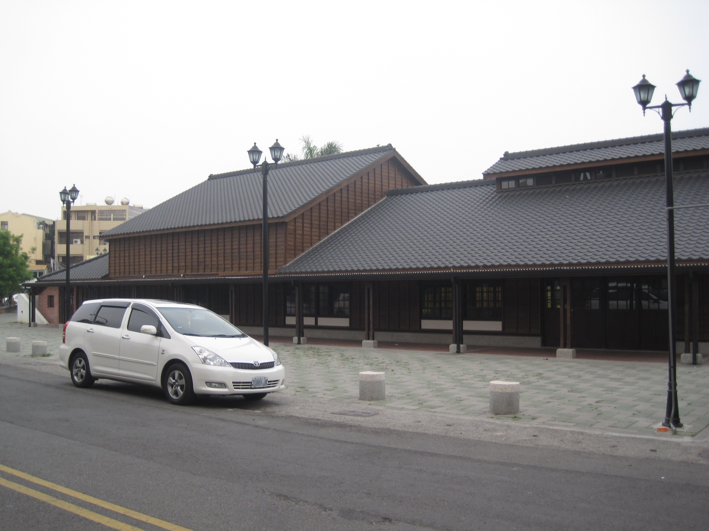 鹽水永成戲院。